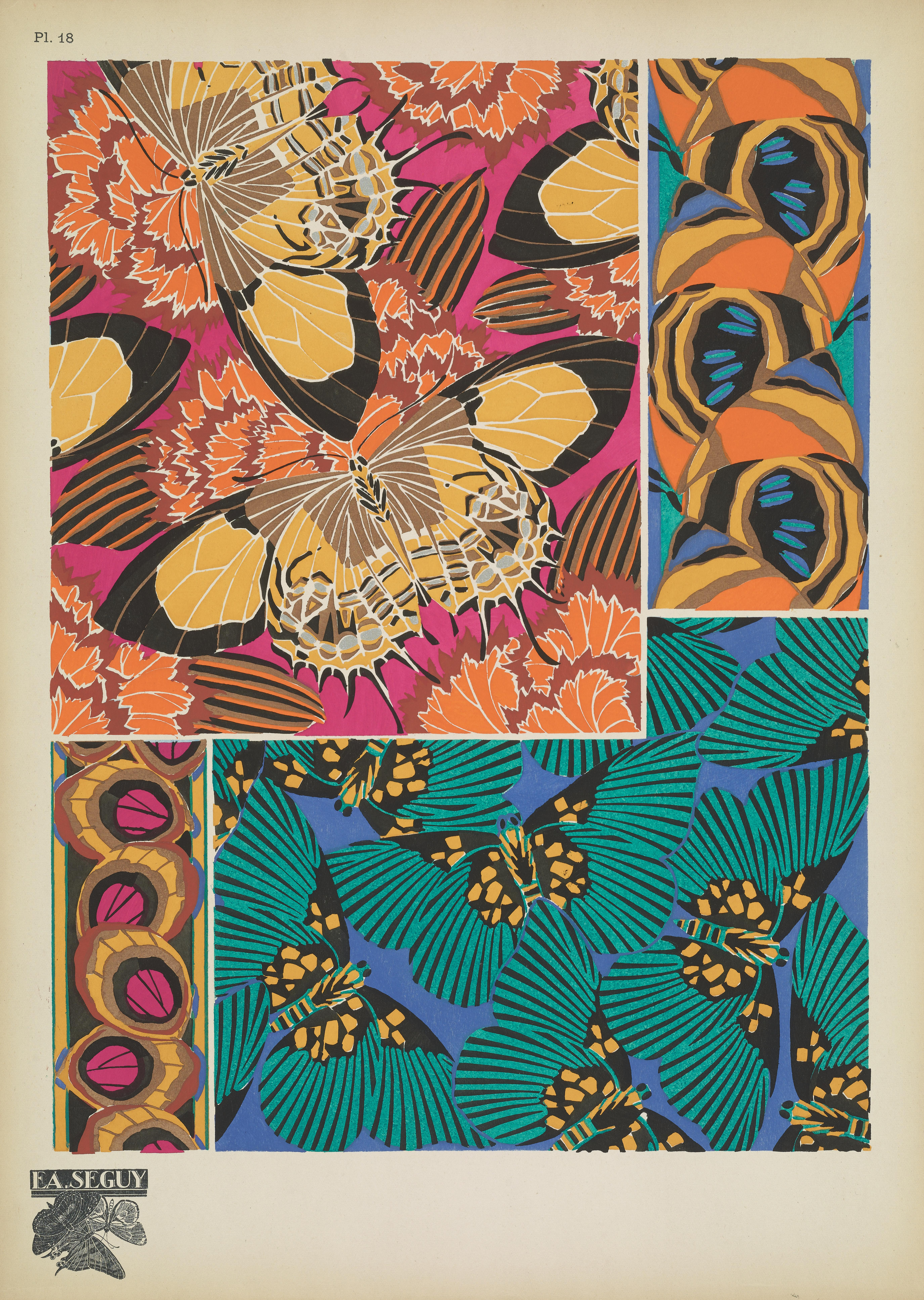 Papillons